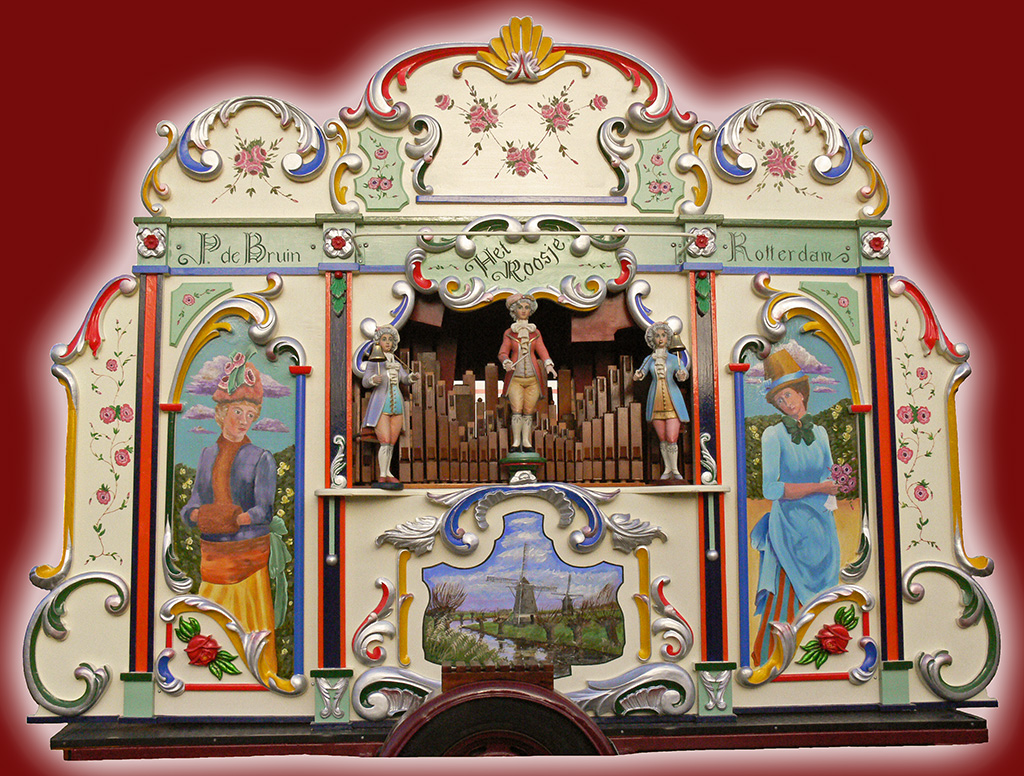 Systeem Limonaire 52 toets Nederlands straatorgel / draaiorgel 'Het Roosje' (voormalige de 'Midinette'), foto genomen in maart 2014.